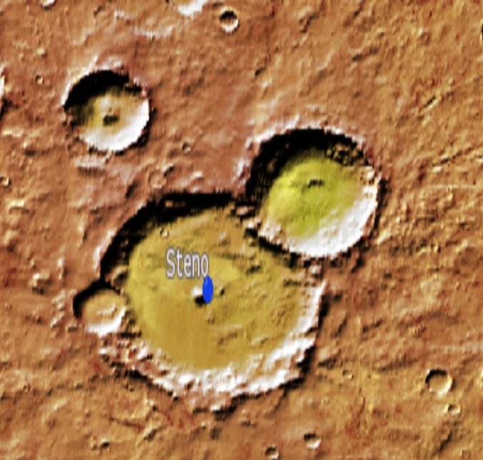 Cráter marciano Steno. (Imagen IAU/USGS/Goddard/A SU/USGS)